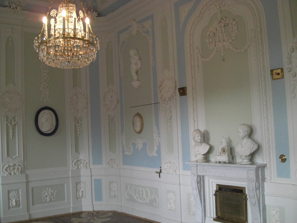 Туалетная в Большом Гатчинском дворце